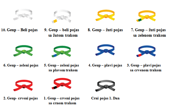 Slika tekvondo pojaseva i njihovo ime